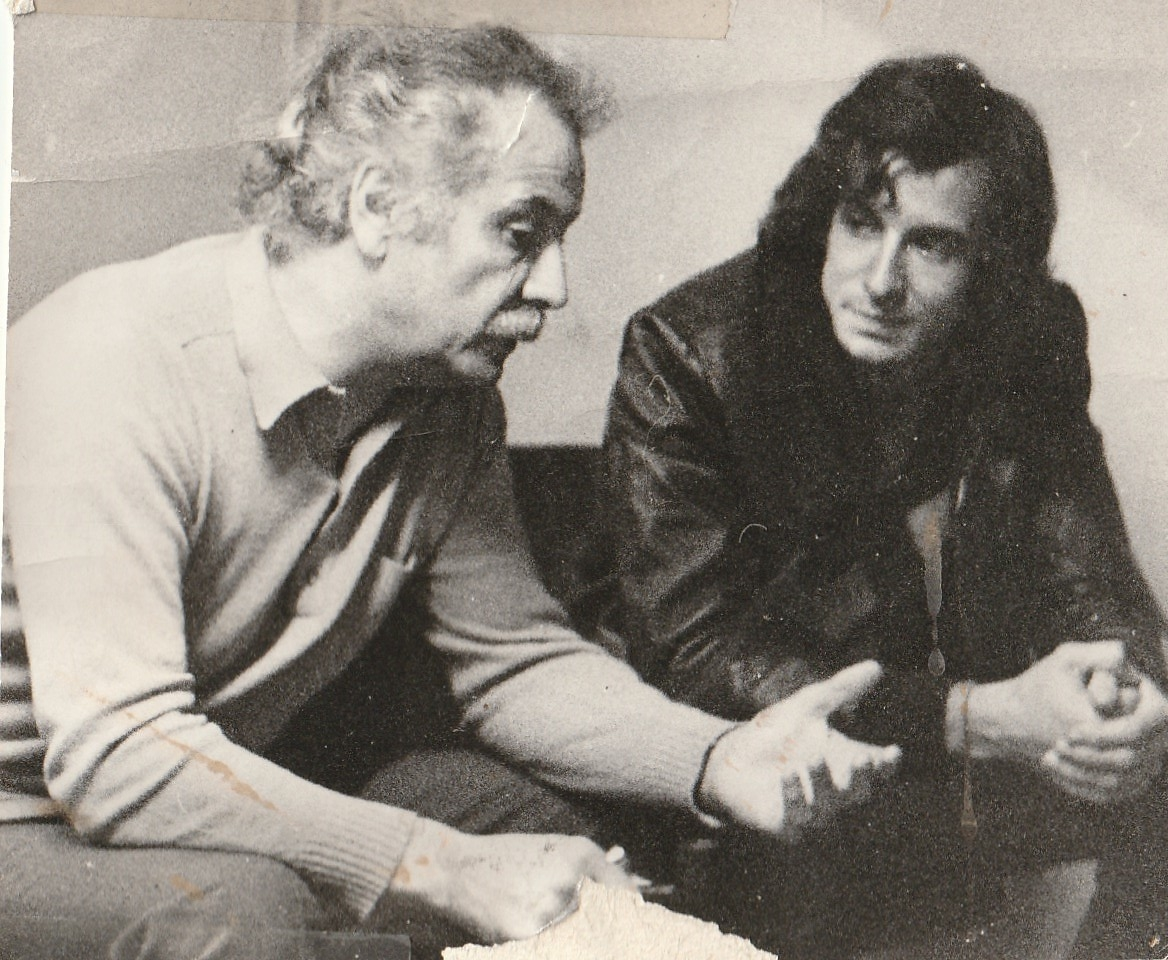 Dans la loge de Georges Brassens. 1973